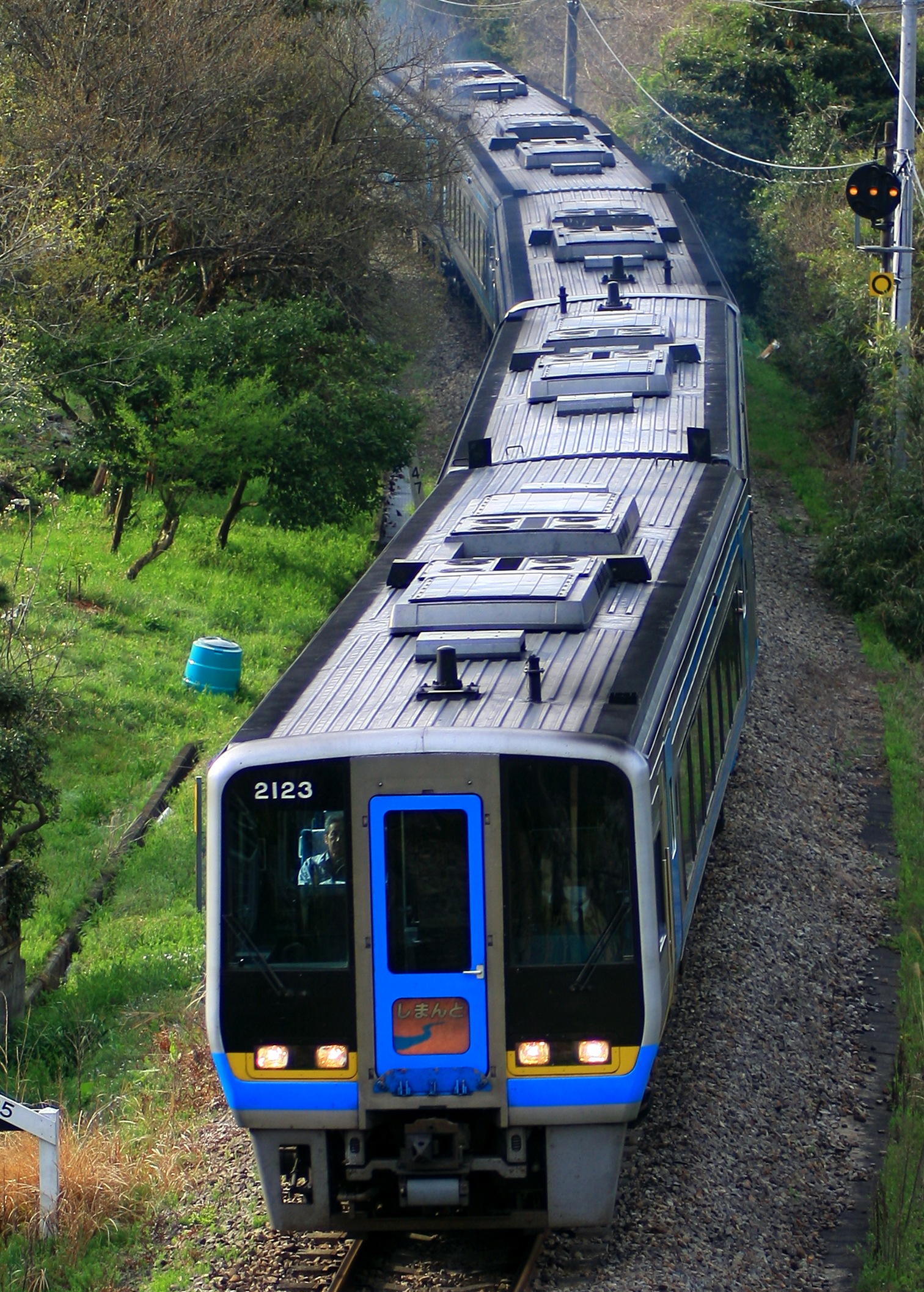 しまんと4号